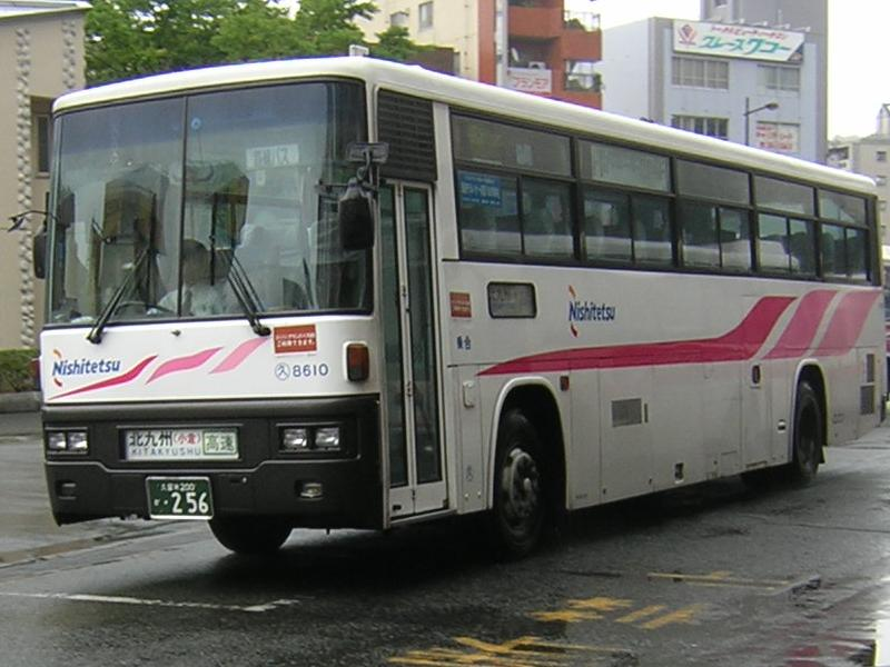 登録番号 久留米200か・256 西日本鉄道所属 車番8610 北九州～久留米線用 2005年8月1日 久留米駅前にて撮影